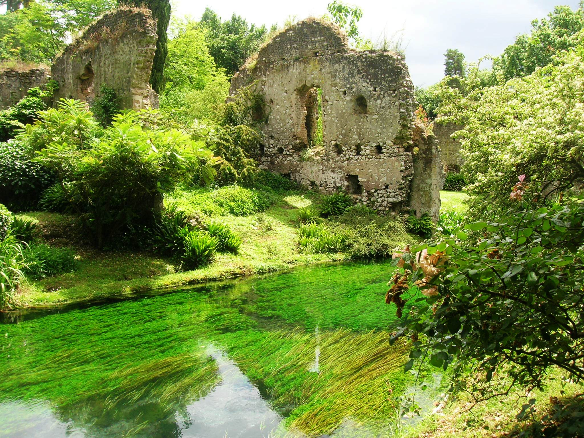 Il fiume Ninfa tra i ruderi di Ninfa